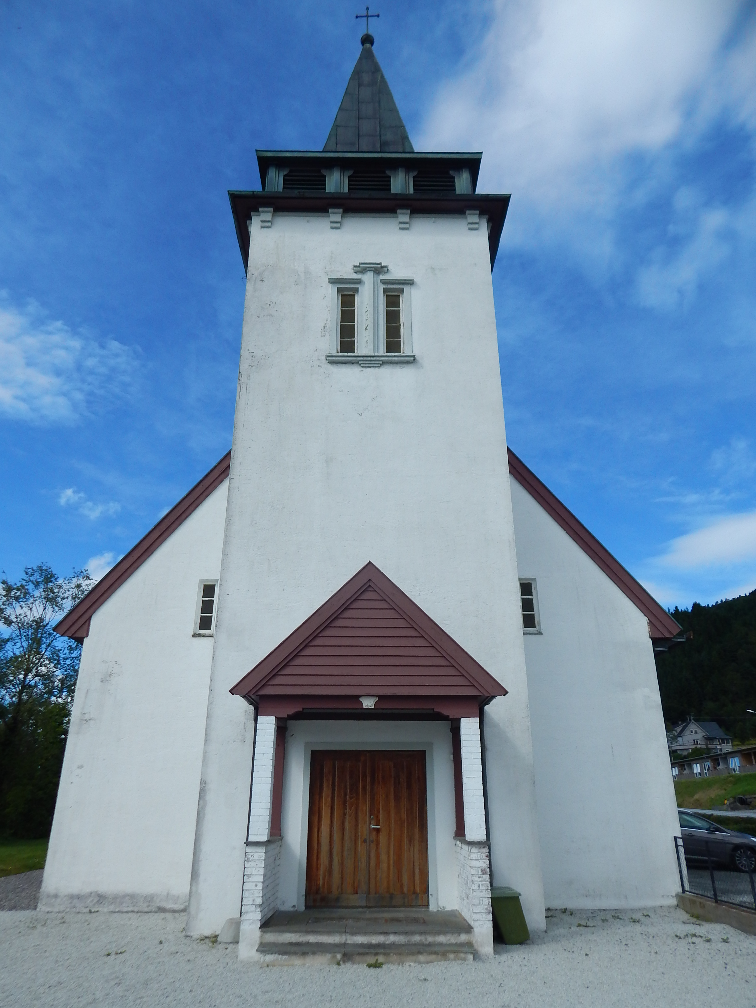 Øn kirke